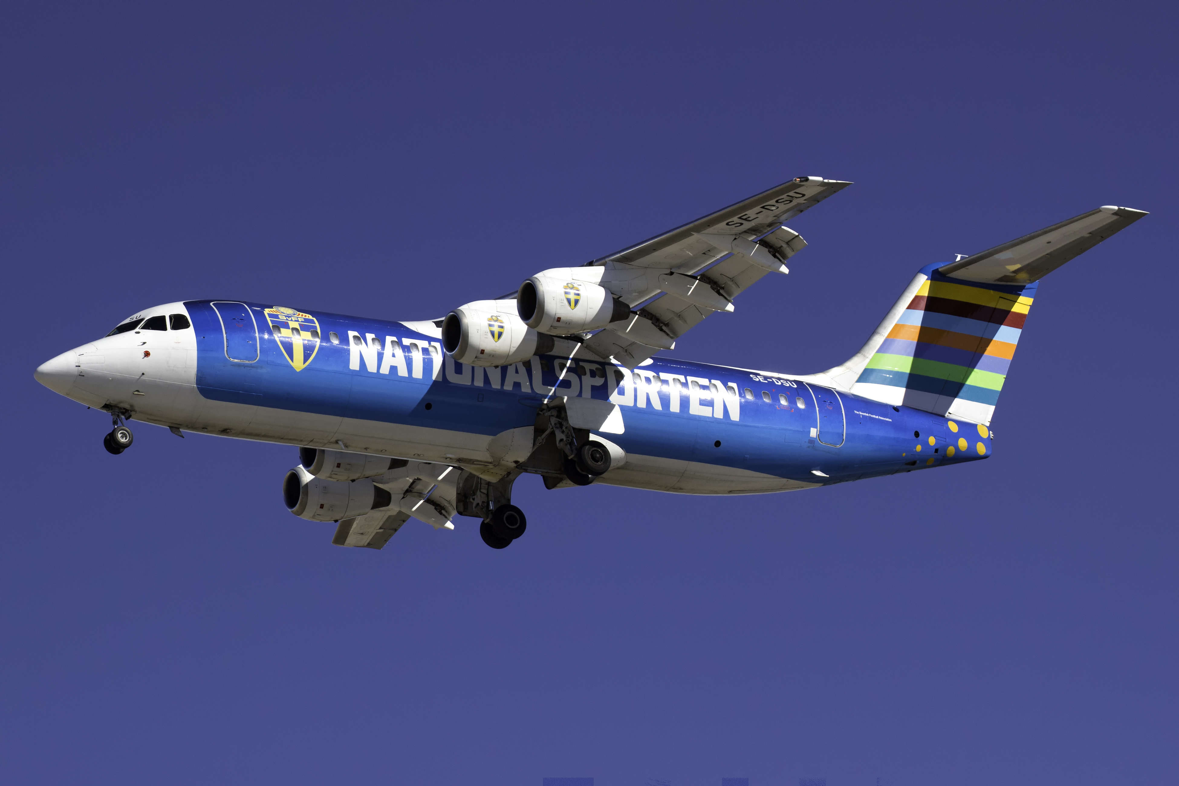 Avro RJ100 de BRA aterrando no aeroporto de Visby.